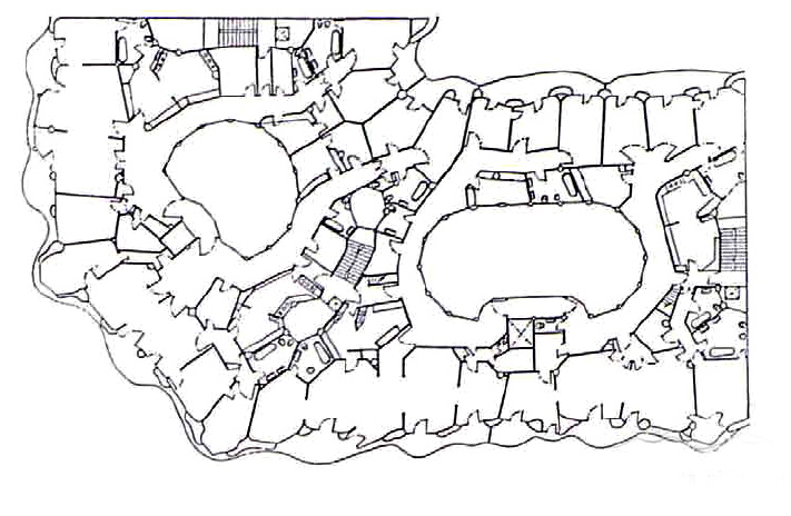 Reproducció de la planta de la casa Milà apareguda a la revista "Cuadernos de Arquitectura y Urbanisme" l'any 1977